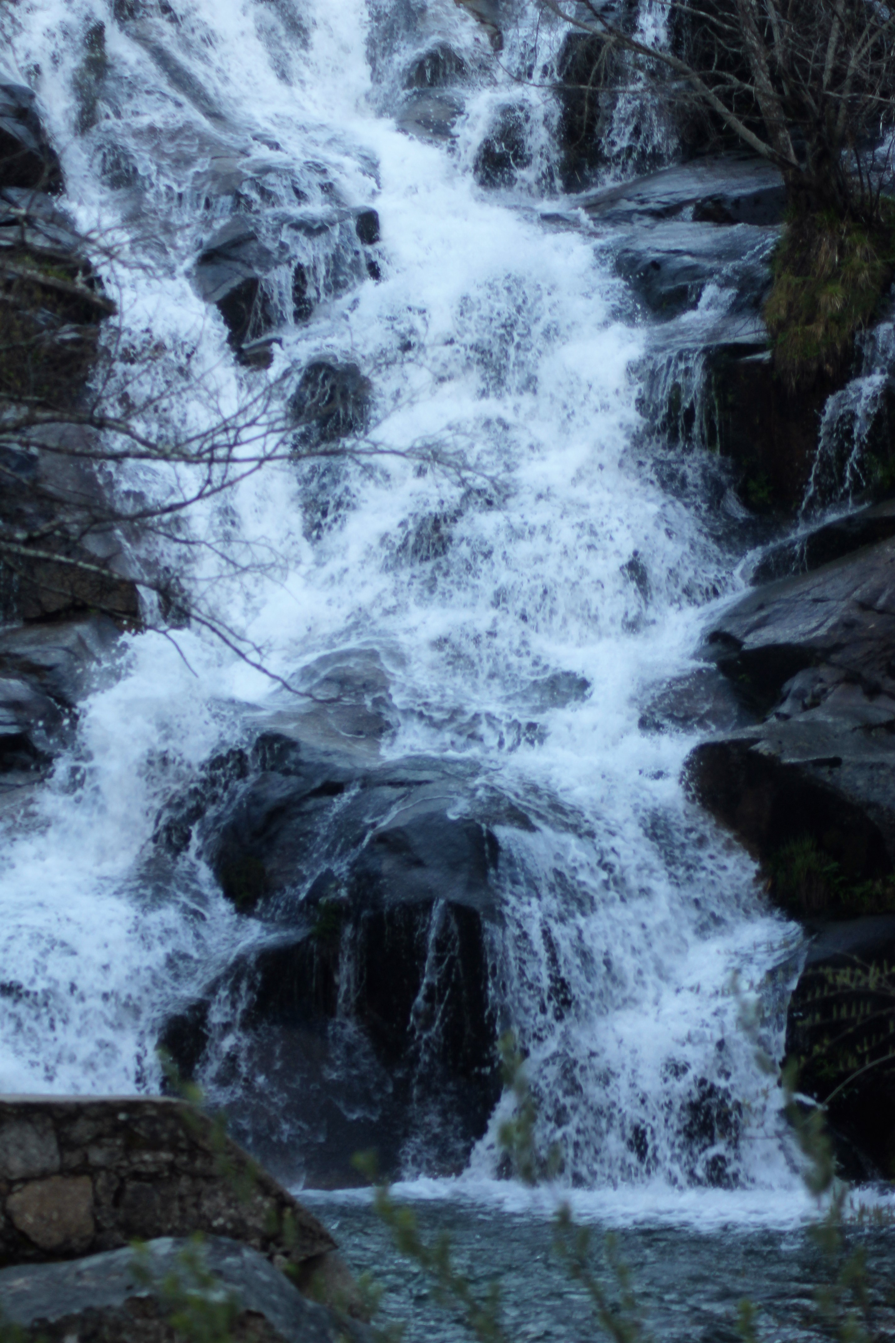 Cascadas del Caozo.